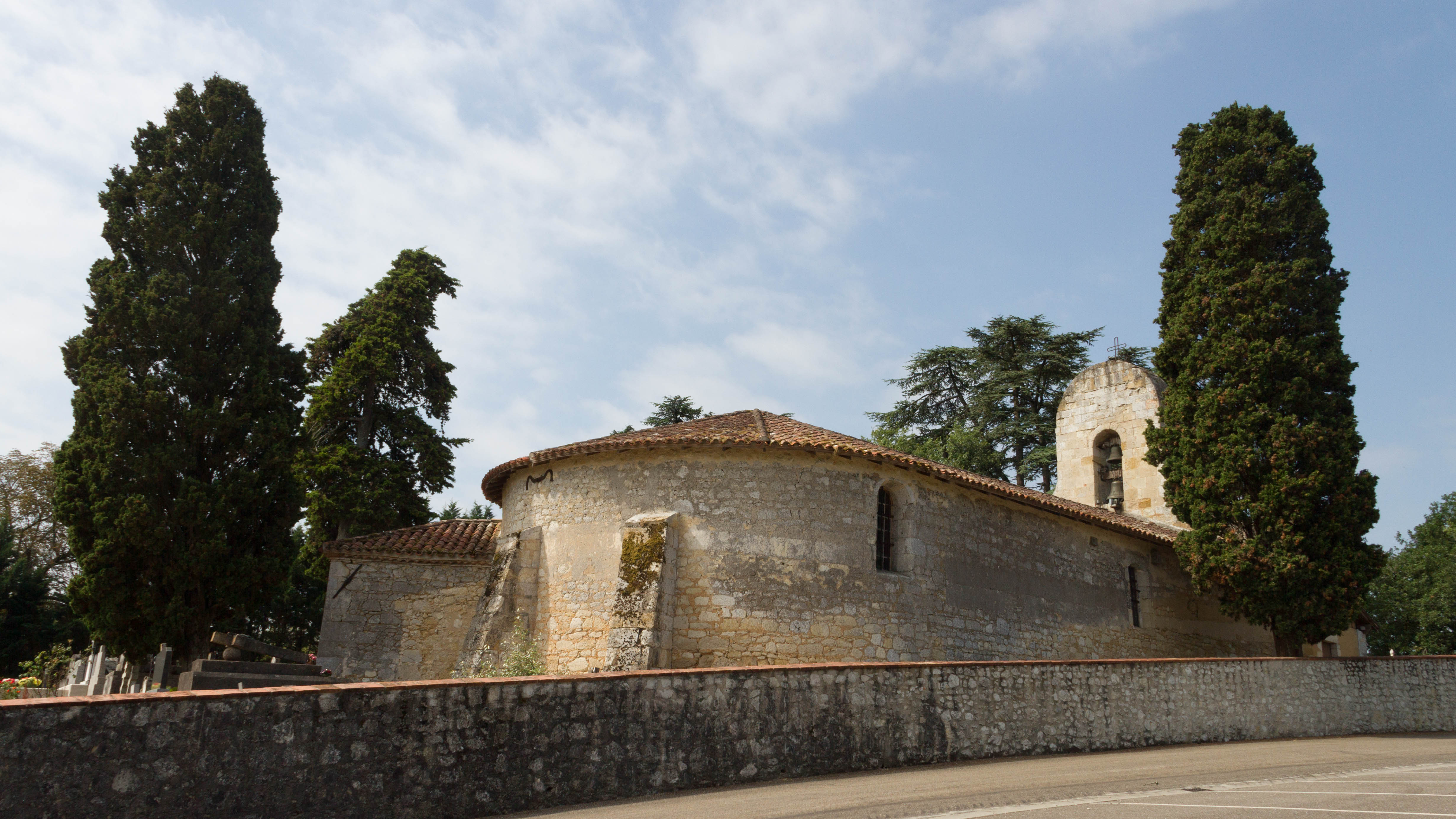 Église Saint-Jean-Baptiste d'Estillac